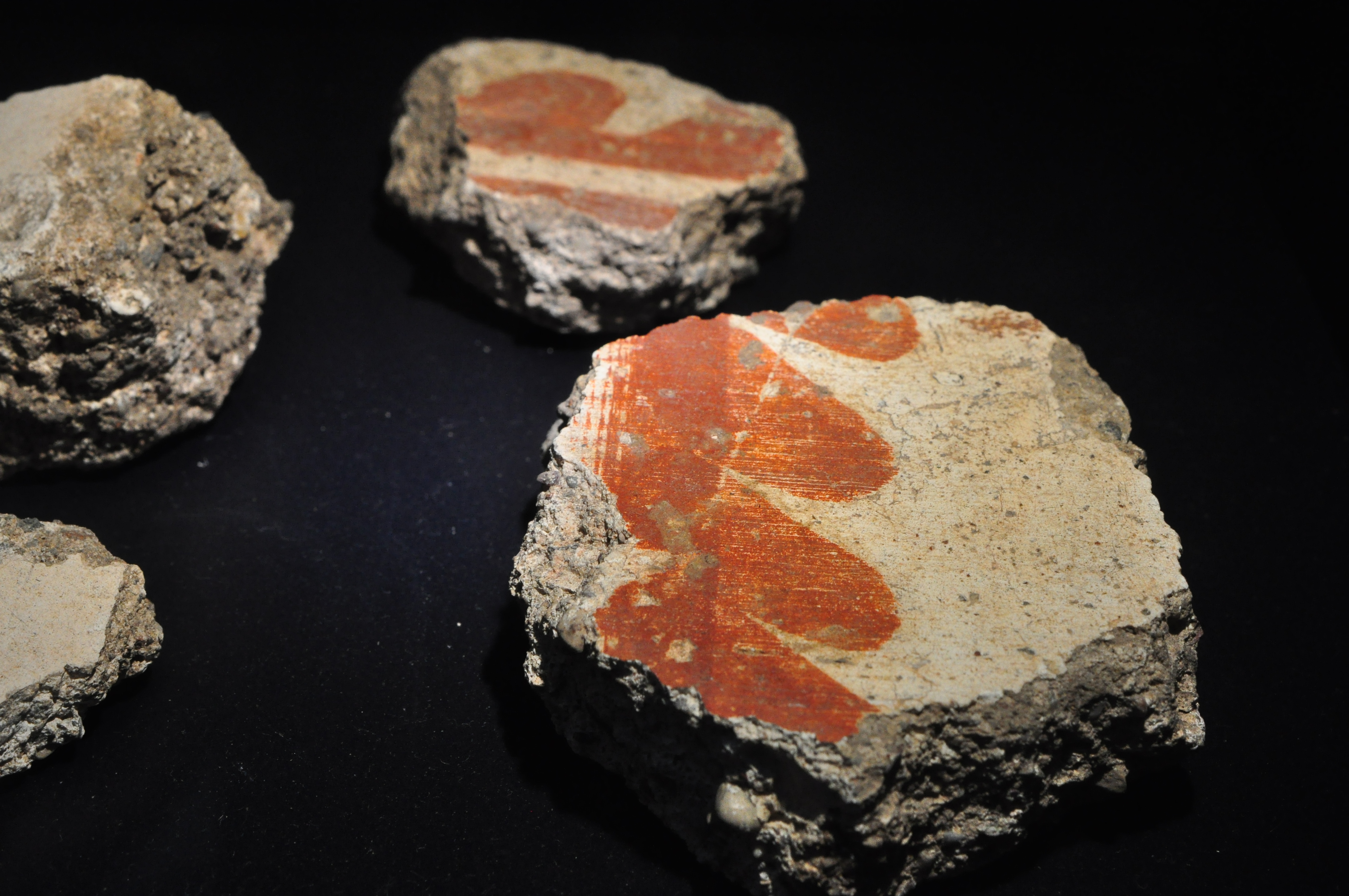 Exponat aus der Thermengasse im einstigen römischen vicus Turicum (Zürich) : Verputzreste von bemalten Wänden aus den Bädern. Beim Bad II aus dem 2./3. Jahrhundert mit feinen farbigen Linien auf grossflächig weissen Wänden. (gemäss Beschriftung in der Vitrine)